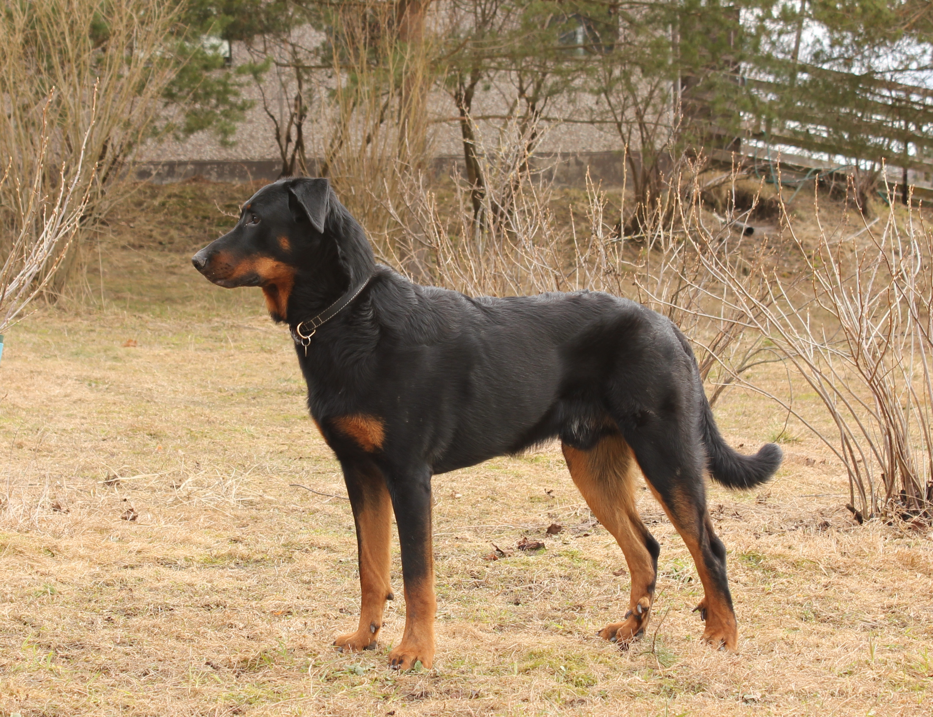 Uros beauceroni.